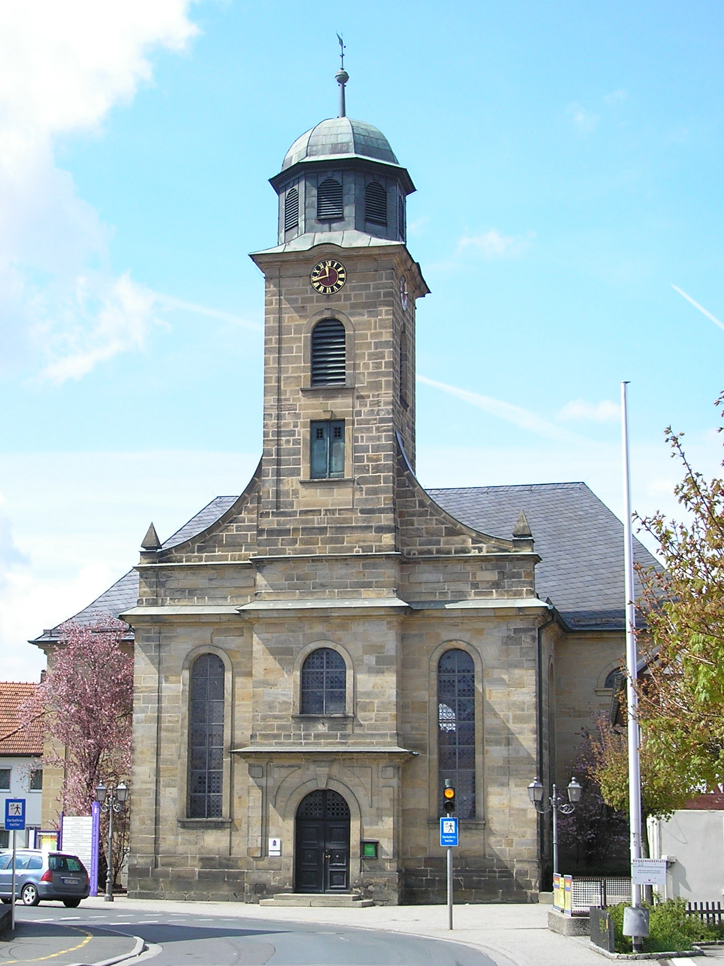 Dorfkirche von Michelau in Oberfranken (Bayern, Deutschland).